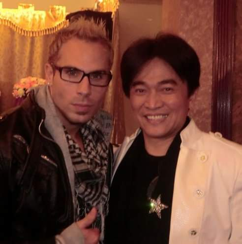 2011年に台湾の台北でWu Zong Xianとグローバー